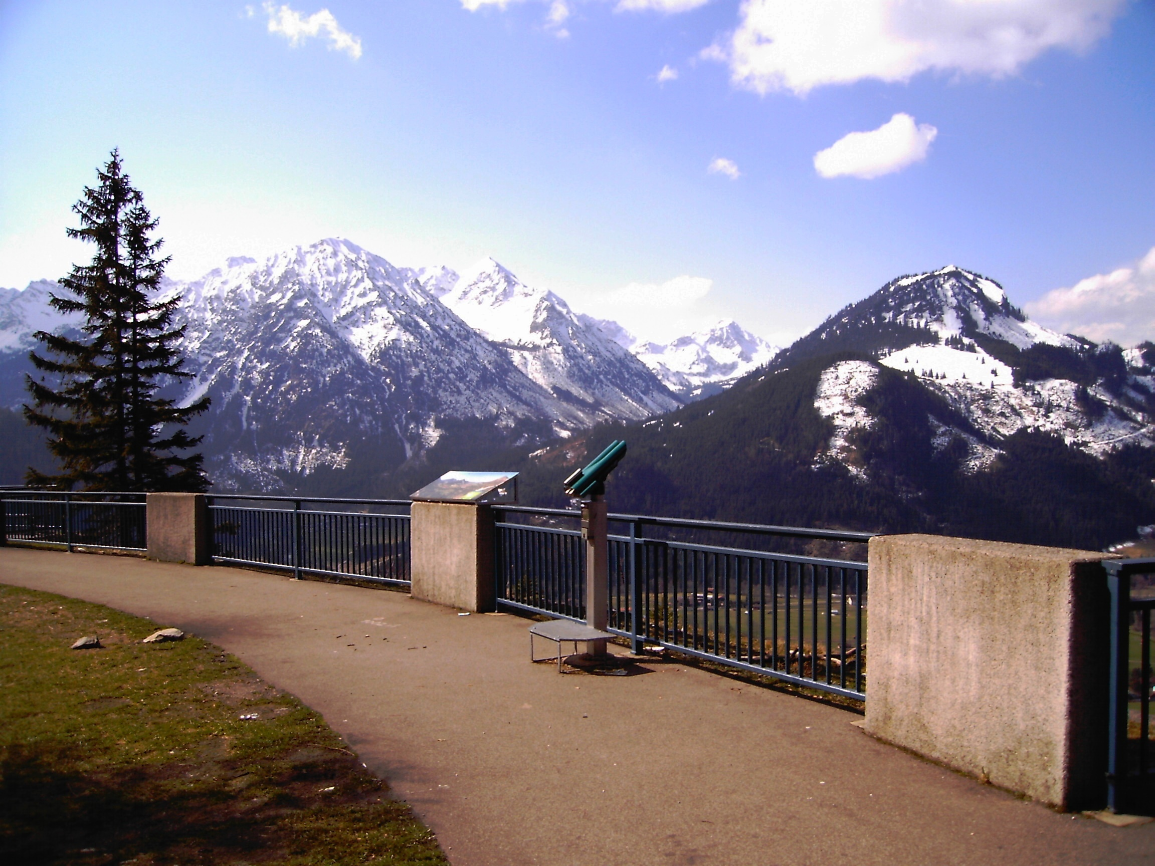 Der Aussichtspunkt am Oberjochpass an der Bundesstraße 308 mit Blick nach Süden auf Breitenberg (1893 m), Rotspitze (2034 m), Entschenkopf (2043 m) und Imberger Horn (1655 m).